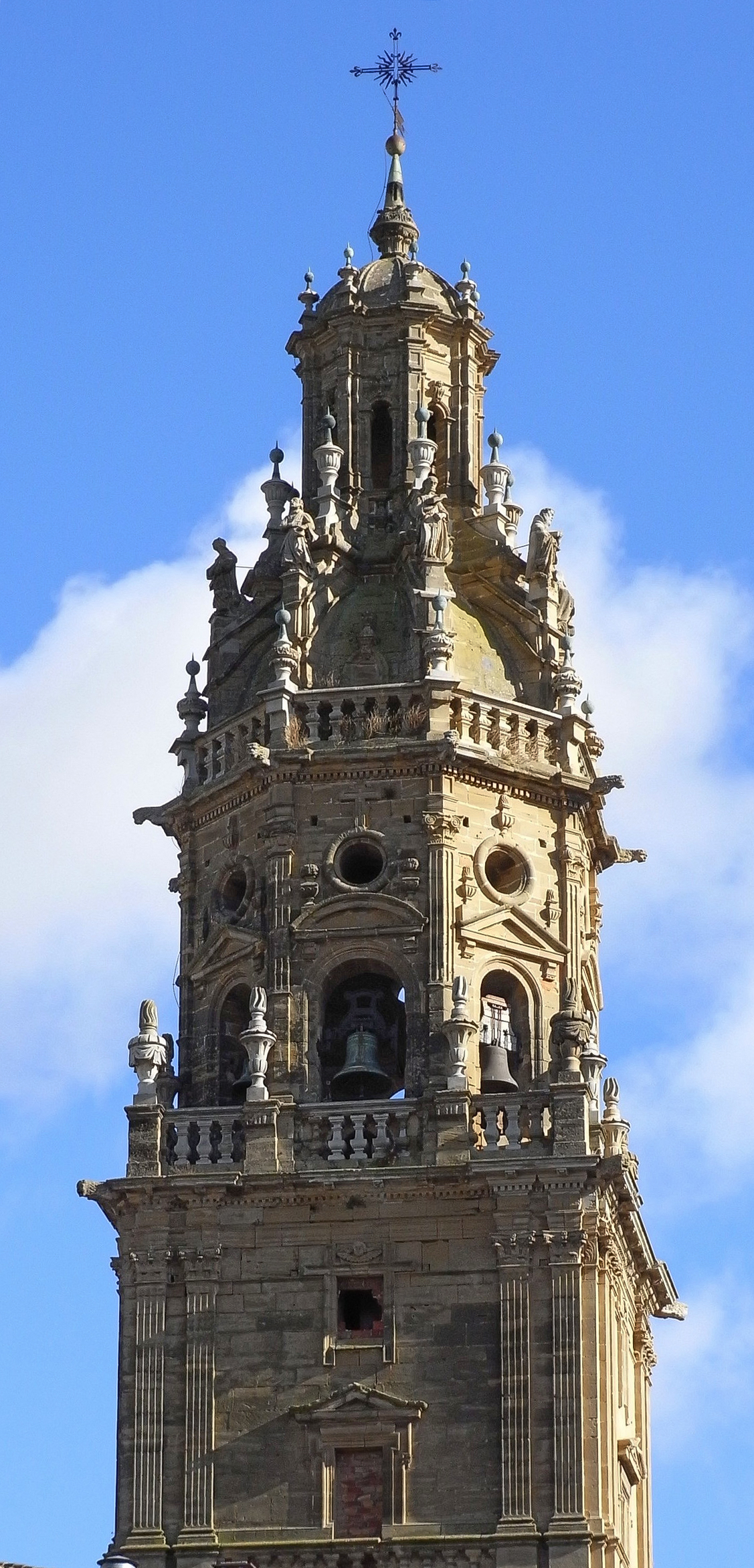 Iglesia de Santo Tomás. Haro, La Rioja (España) - Campanario y cúpula.